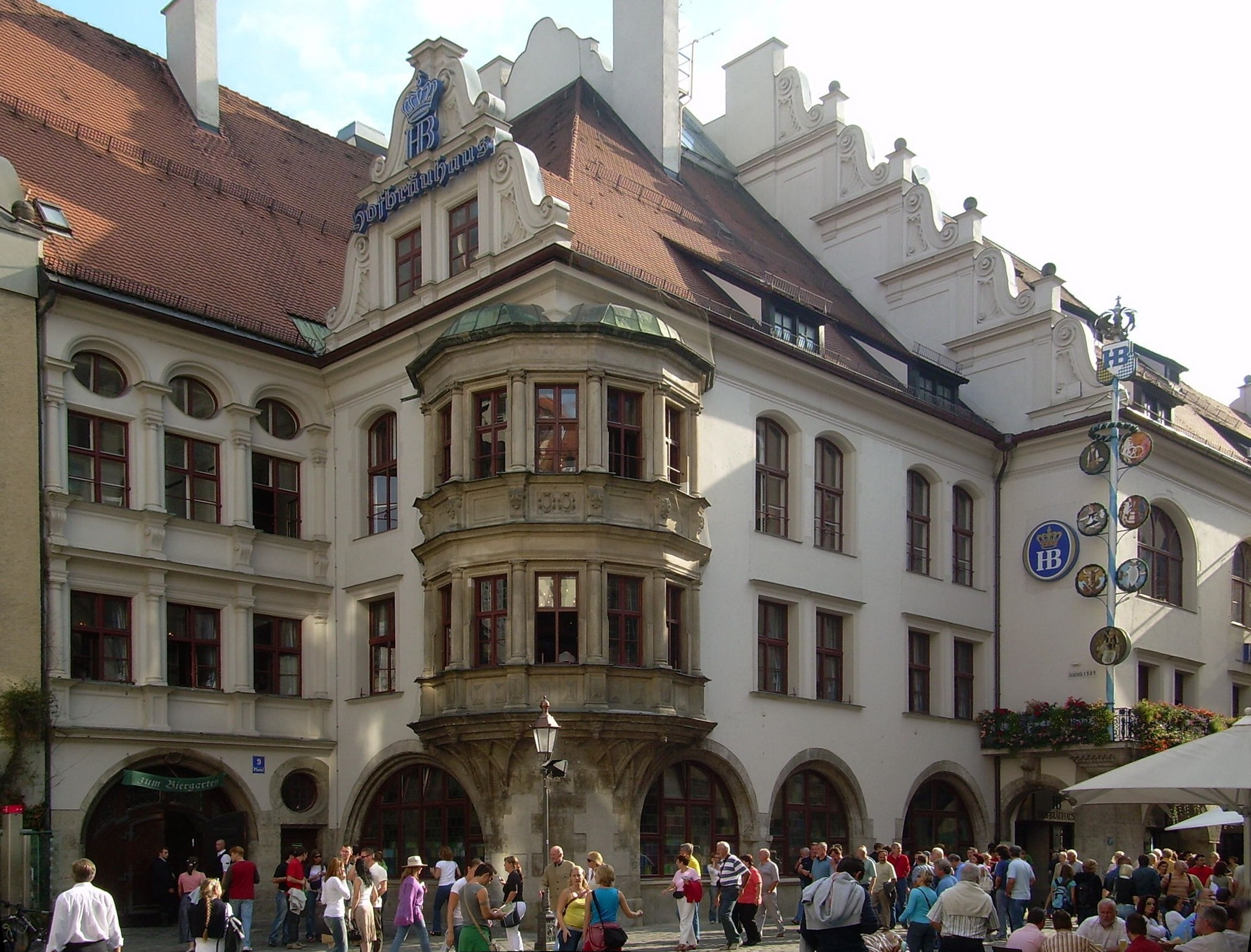 hofbrauhaus esterno